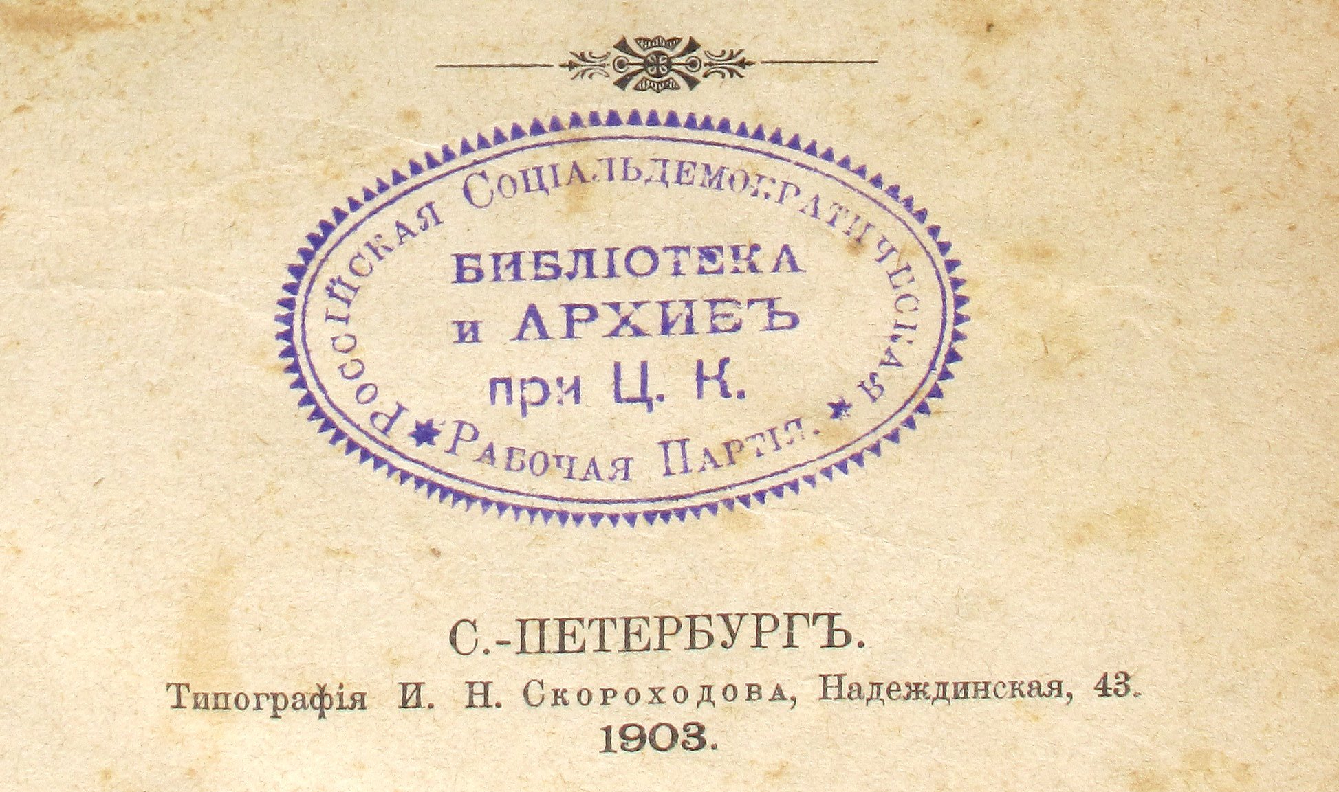 Tampon POSD russe